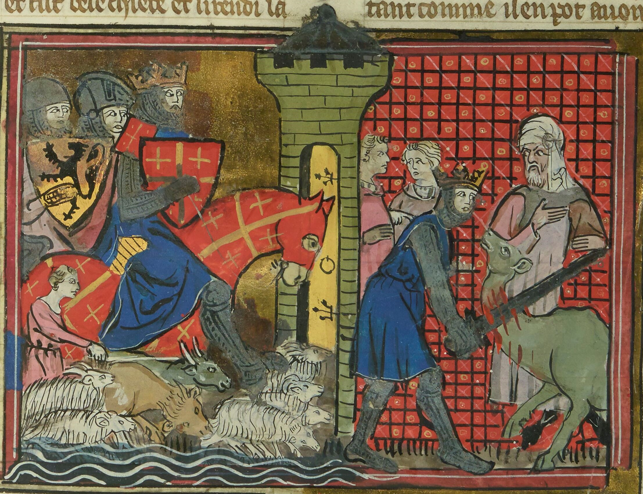 Godefroy de Bouillon passant le Jourdain et tuant un chameau